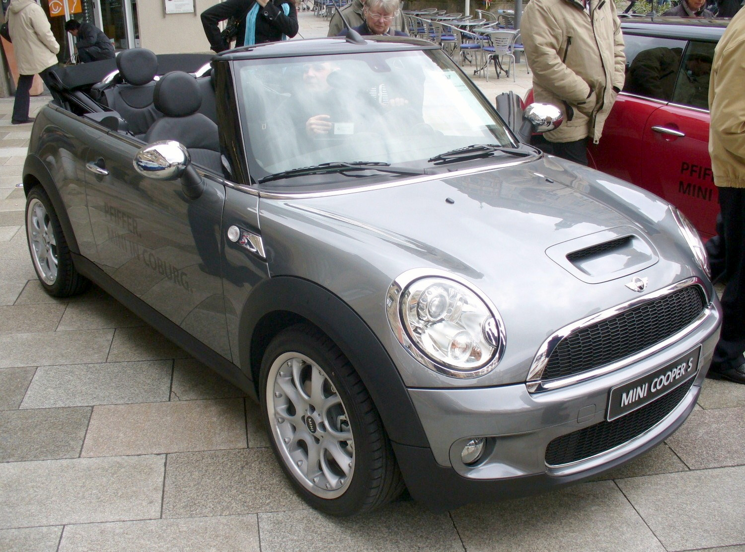 Mini R56 Cabrio